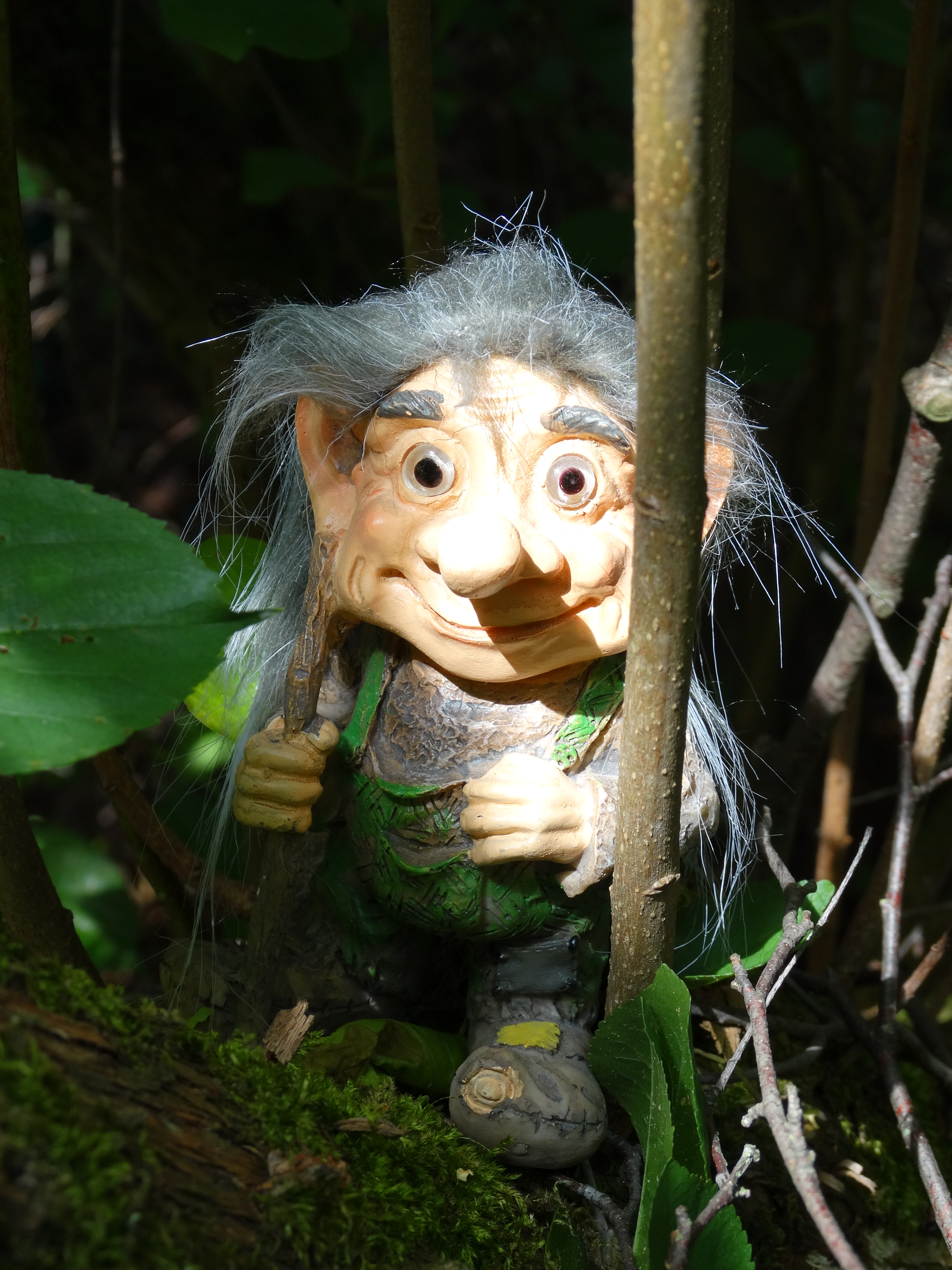 Gnom im Westend-Viertel der Stadt Hof an der Saale